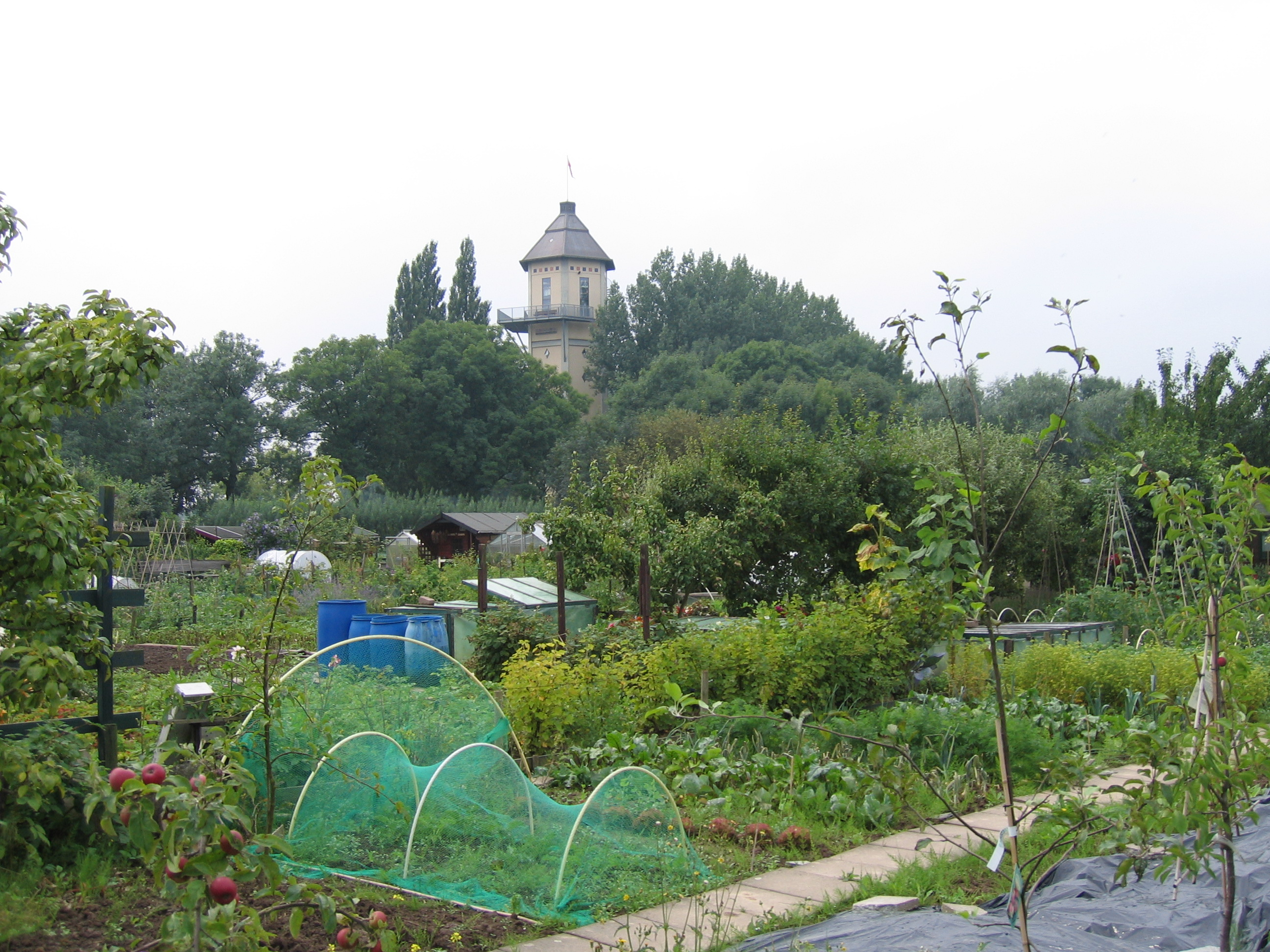 moestuinpark